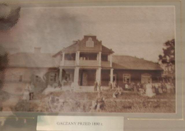 Gačionių dvaras iki1890